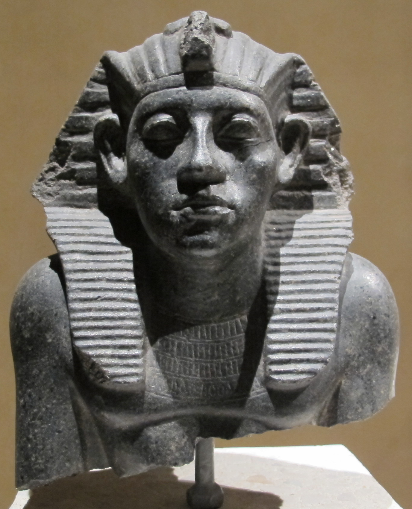 Testa di statua del re amenemhat III con in testa la nemes, 1840 ac. ca